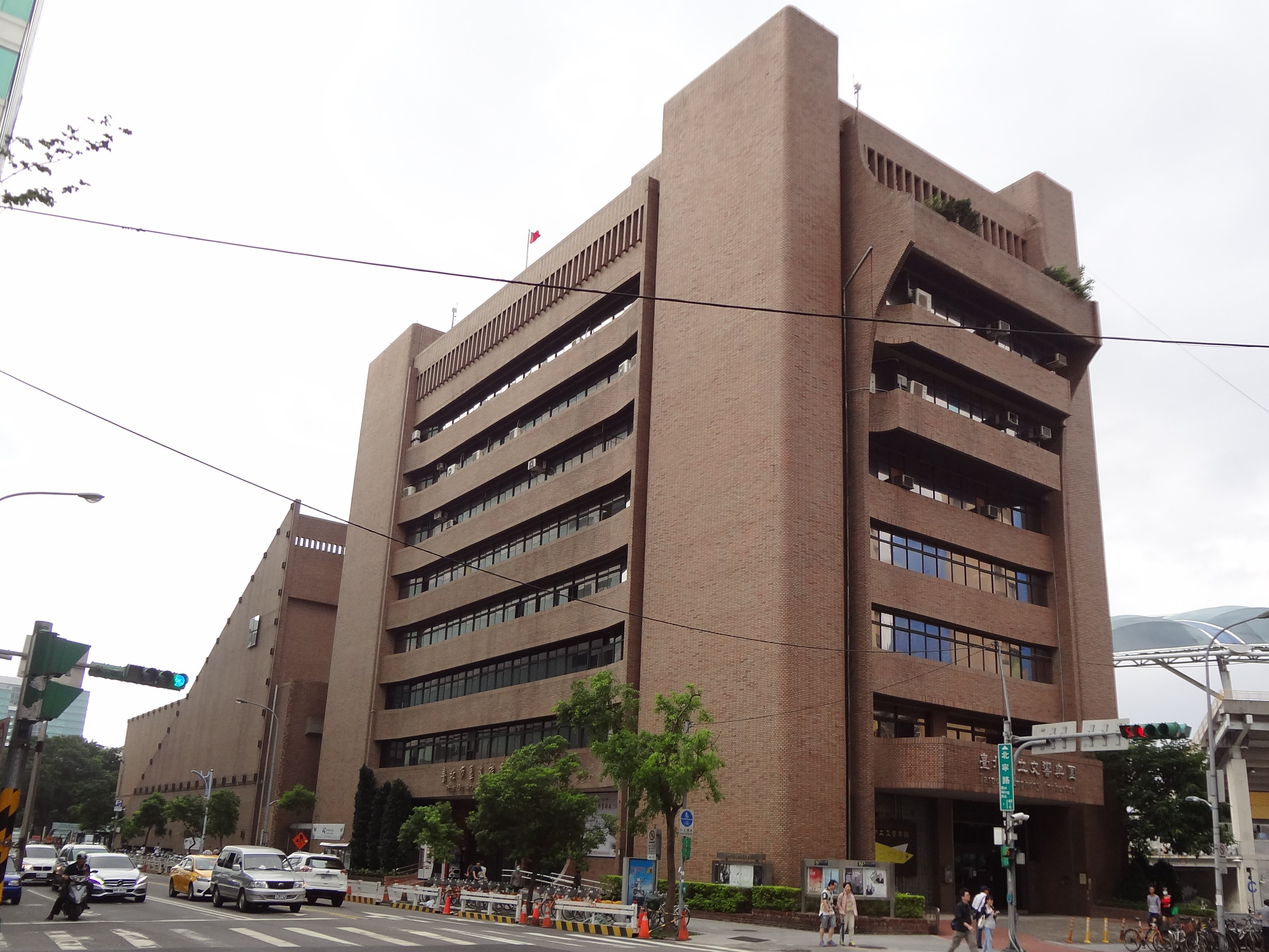 臺北市藝文推廣處藝文大樓，位於臺北市松山區八德路三段25號。